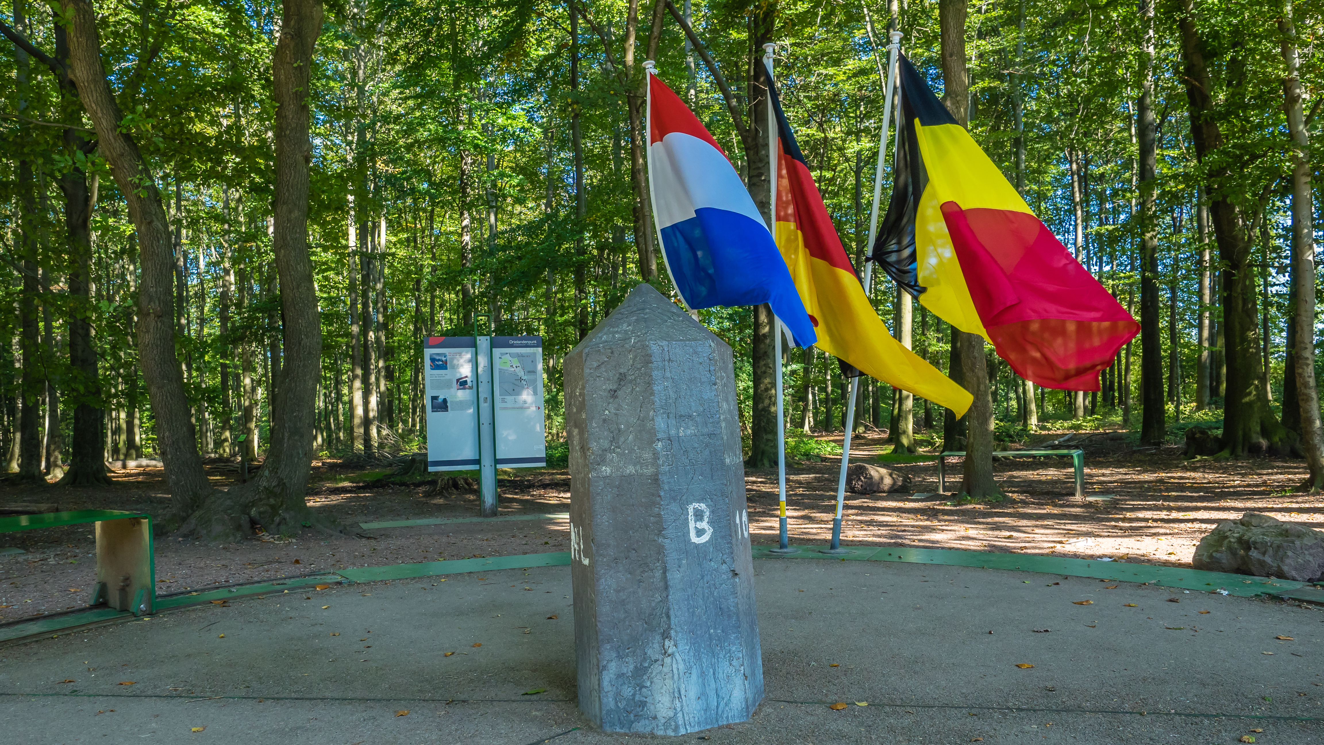 Het in 1928 geopende symbolische drielandenpunt wordt door veel toeristen aangezien voor het echte drielandenpunt, dat ongeveer vijftig meter verderop ligt. De verwarring wordt vergroot door het feit dat twee van de drie grenspalen ooit op het 'echte' drielandenpunt stonden. Het 'echte' drielandenpunt bij Vaals wordt tegenwoordig gemarkeerd door een grenspaal uit 1926. In dat jaar werden de oorspronkelijk in 1839 geplaatste paal nr. 193 (de Bismarckgrenspaal) en de in 1843 erbij geplaatste Nederlandse paal nr. 1 naar het symbolische drielandenpunt verplaatst. De Belgische grenspaal is een kopie die door de VVV Vaals is geschonken als vervanging van de verdwenen Moresnet grenssteen nr. XXXI. In het plaveisel rondom de 'echte' grenspaal zijn alle grenzen, ook die met het voormalige Neutraal Moresnet, aangegeven. Tekst: Wikipedia. =